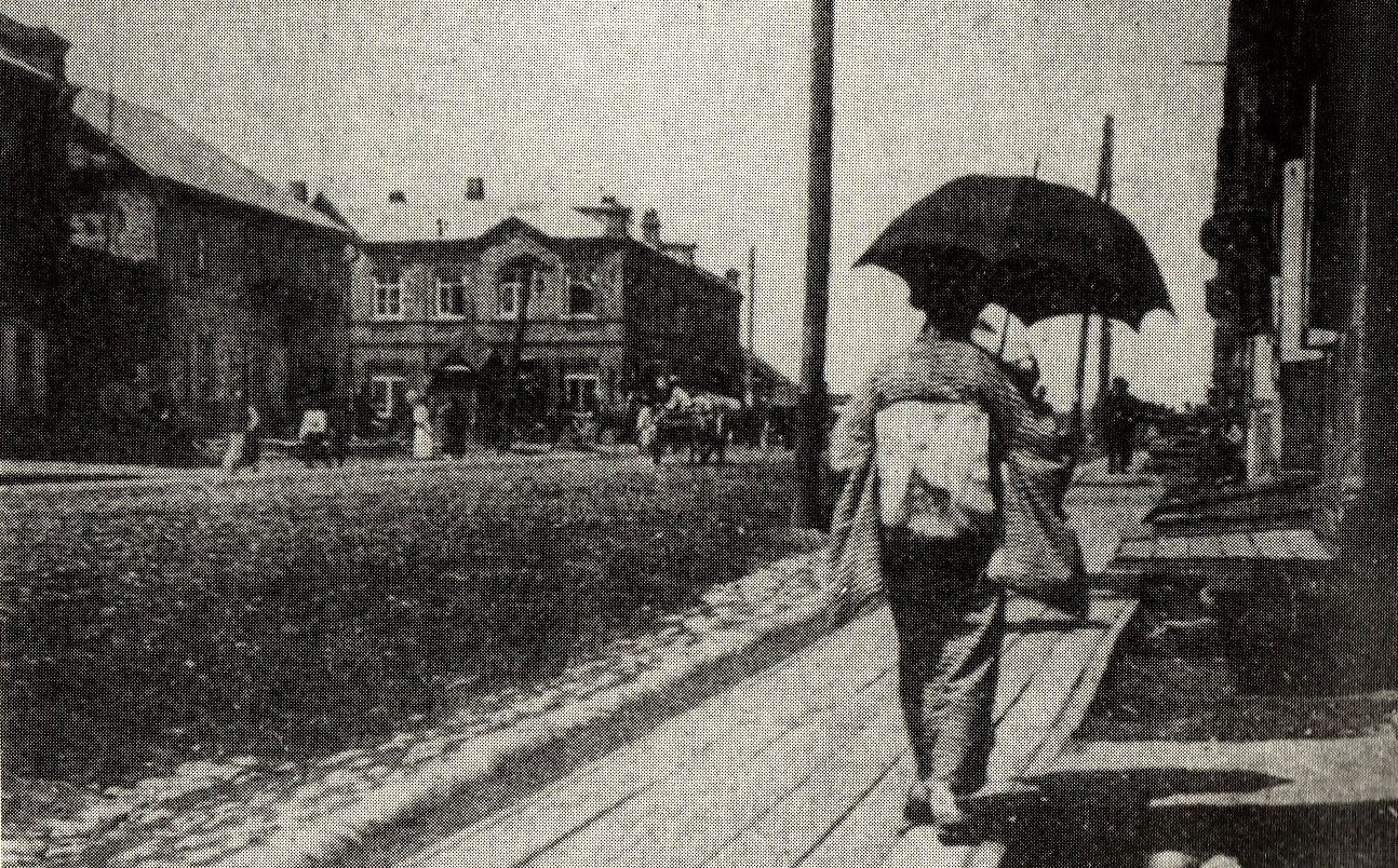 A kimono-clad woman walks down Svetlanskaya Street in Vladivostok